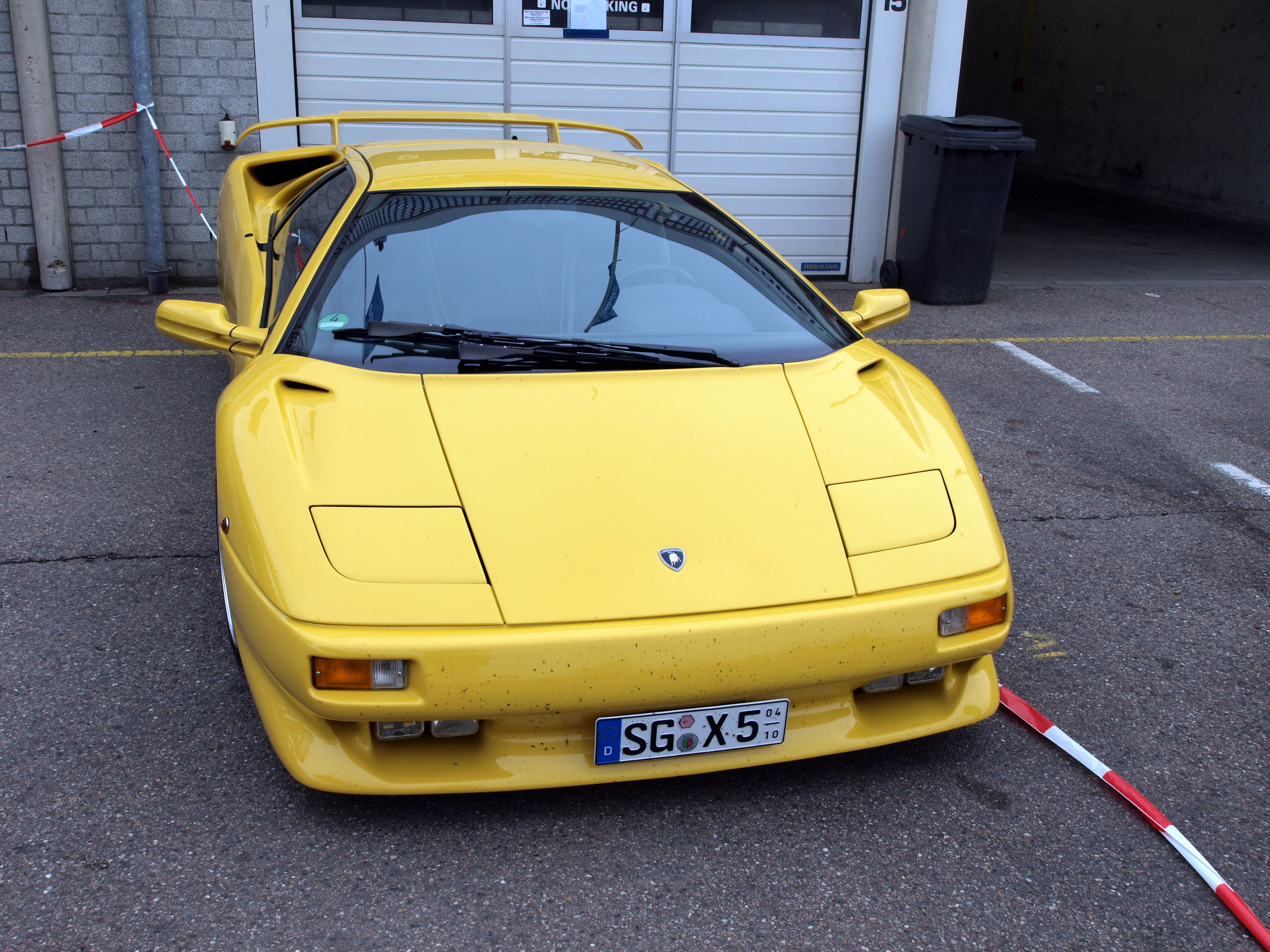 Nationaal Oldtimer Festival Zandvoort 2011.